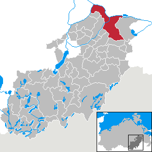 Friedland in Mecklenburg-Vorpommern, Landkreis Mecklenburg-Strelitz